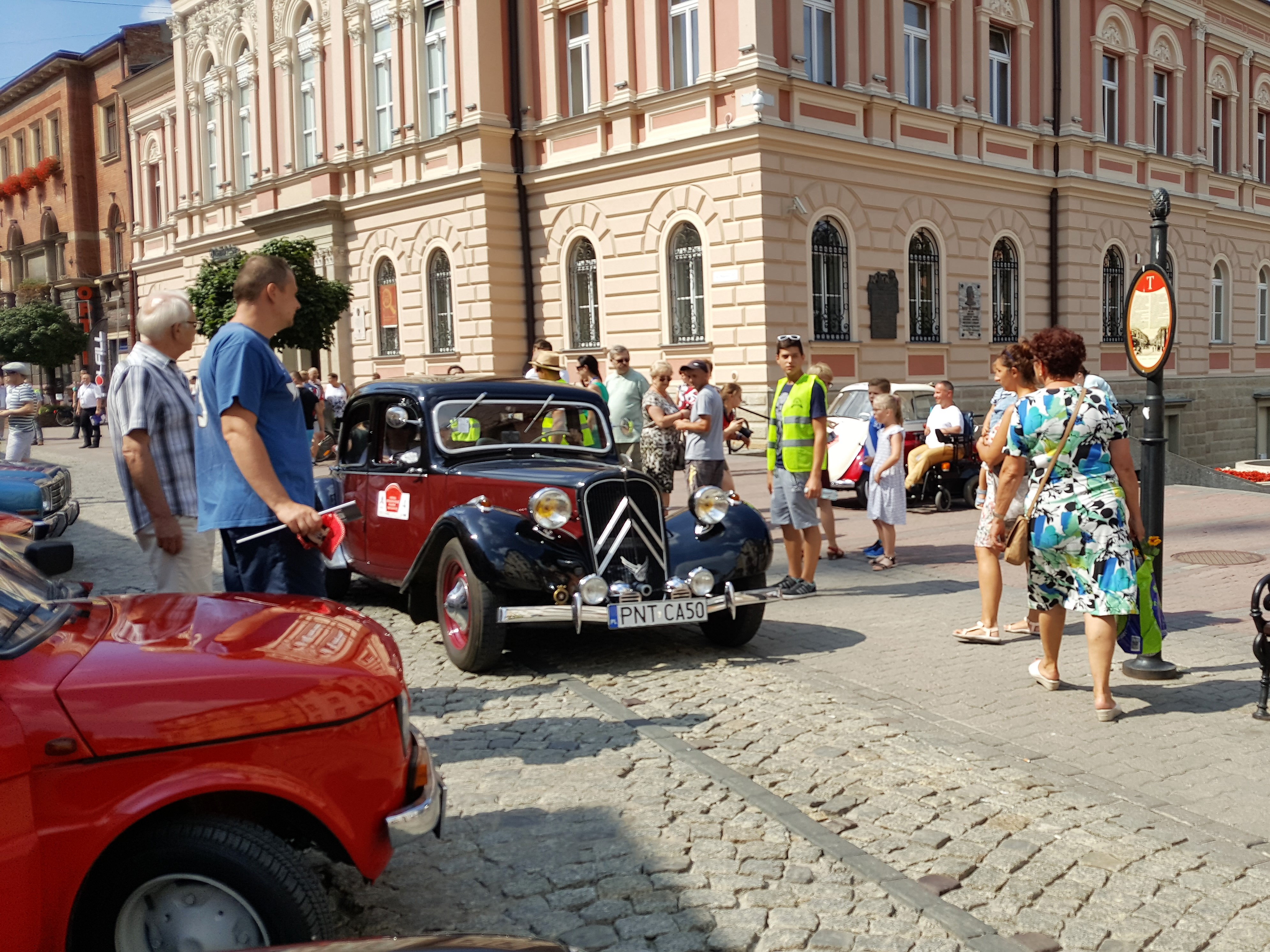 Ulica Wałowa w Tarnowie podczas V Tarnowskiego Rajdu Pojazdów Zabytkowych.